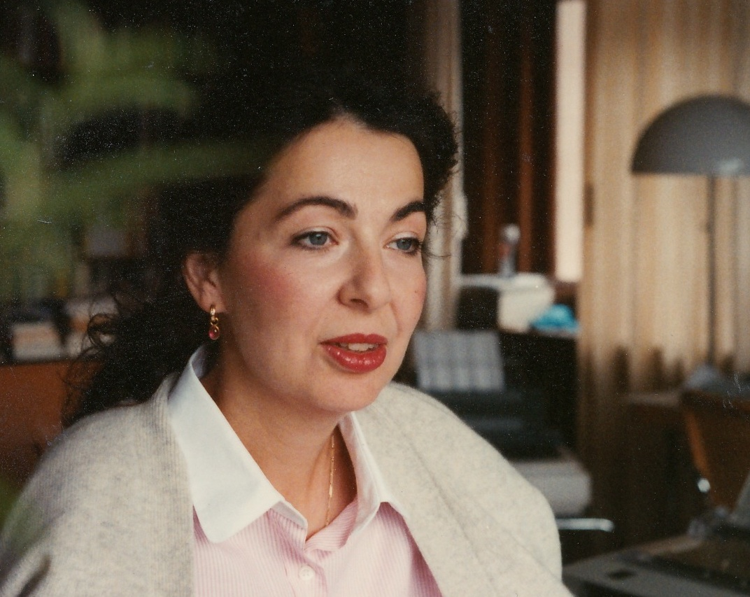 Porträt Judith Le Soldat, Schweizer Psychoanalytikerin, Forscherin, Dozentin und Autorin